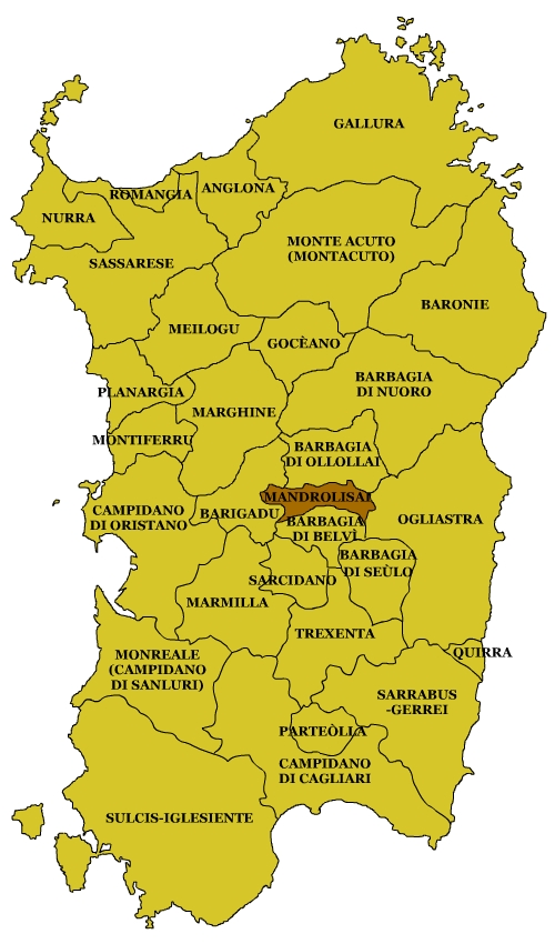 Sardinian Subregions